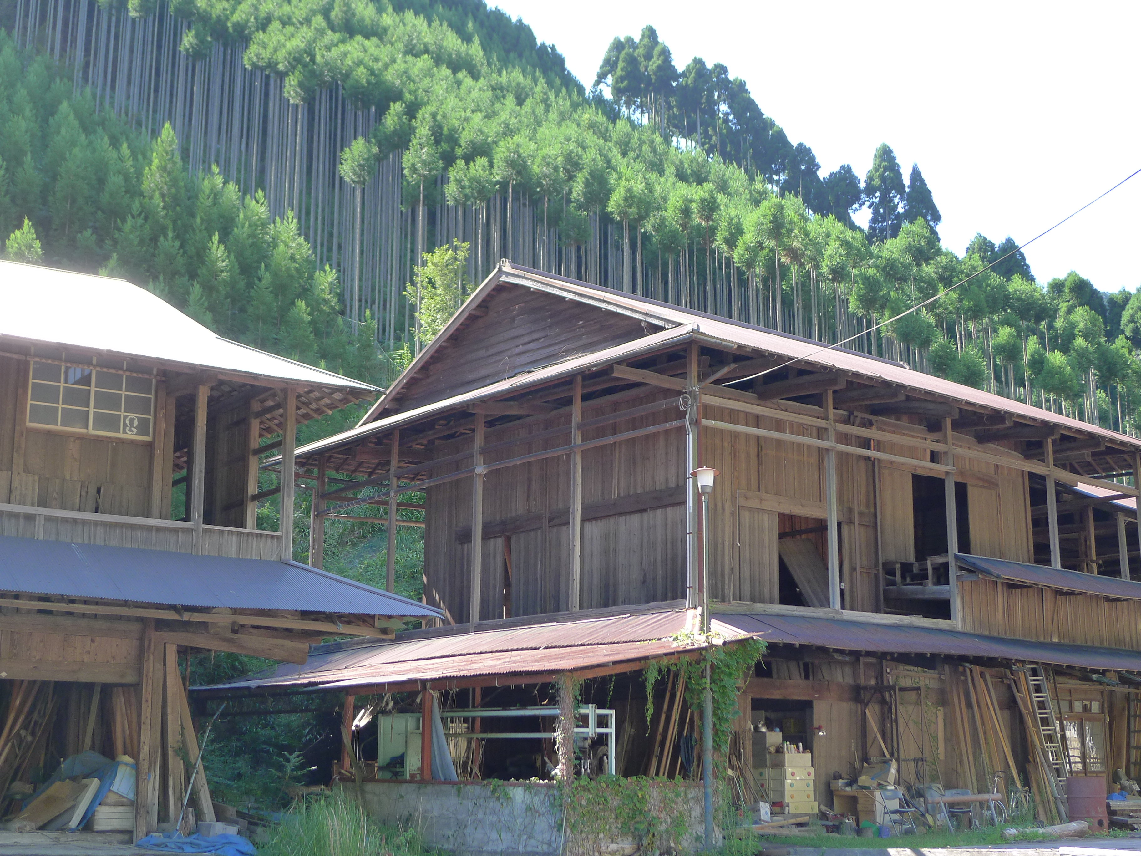 京都市北区北山「杉の里」中川地区の背後の山の斜面に育成させる北山杉（手前は材木業者の倉庫・作業場）